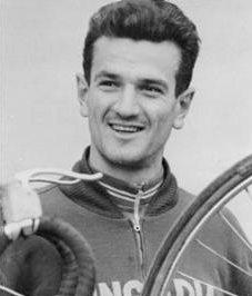 Győző Török